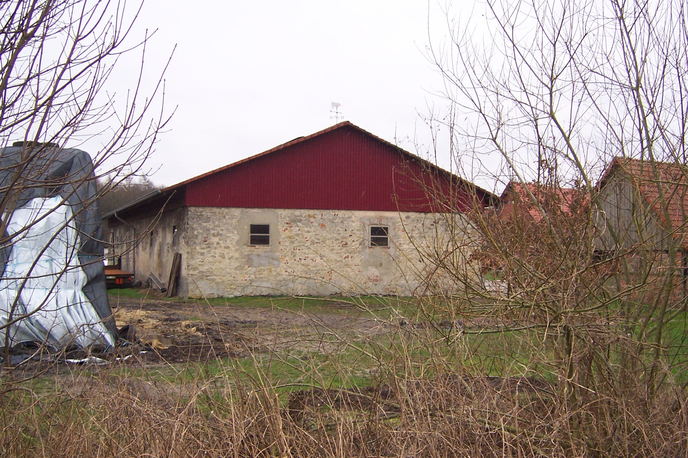 Das Gebäude ist das ehemalige Brauhaus des aufgelösten und überwiegend abgerissenen Klosters Klein-Burlo bei Darfeld, Kreis Coesfeld, NRW.